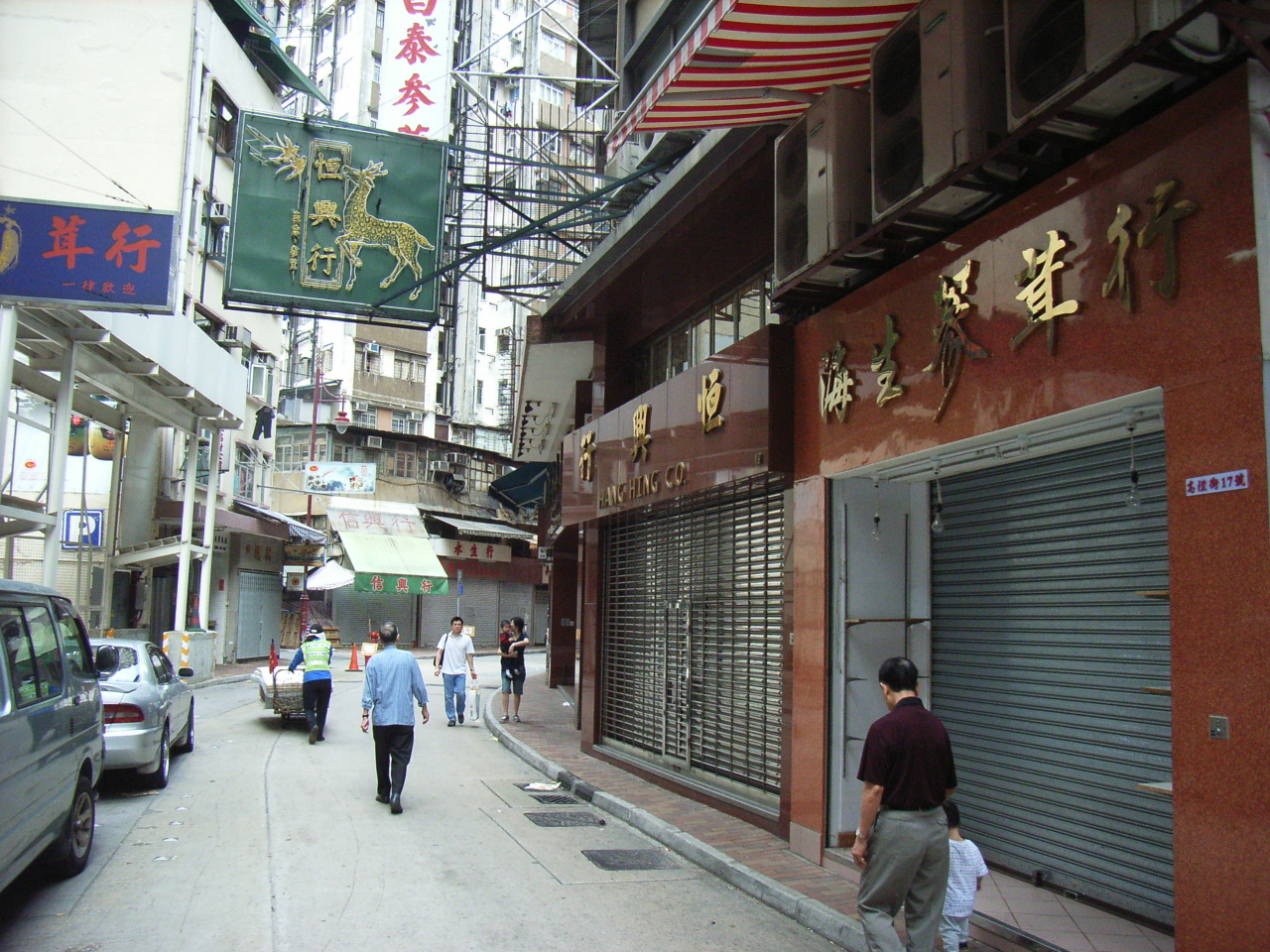 Ko Sing Street, Sai Ying Pun, HK 高陞街又名「藥材街」，位於zh:西營盤，是一條弧形的街道，因批發中國藥材而成名。